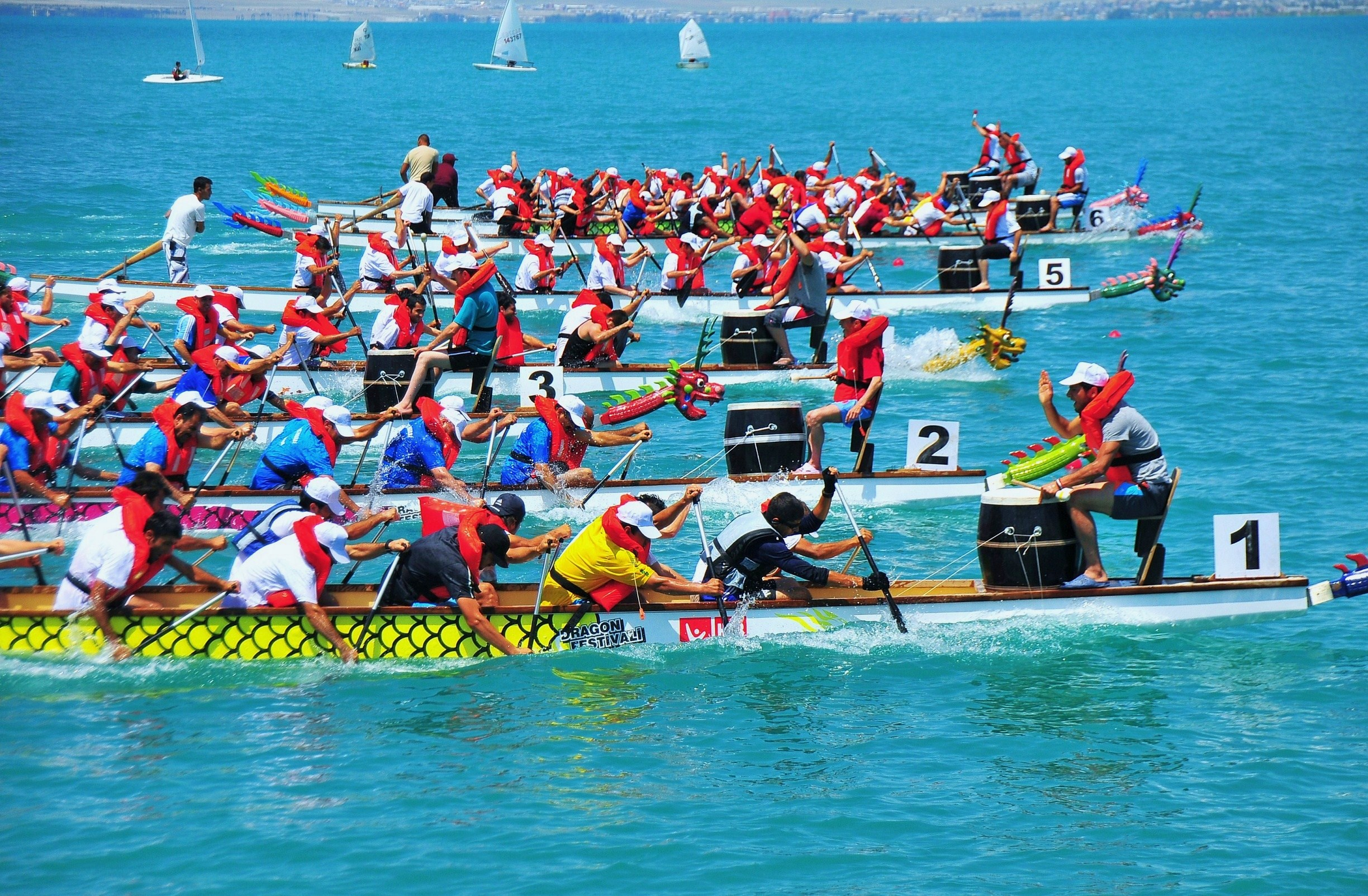 Kurdî: Festîvala u Behra Wanê, sala 2011